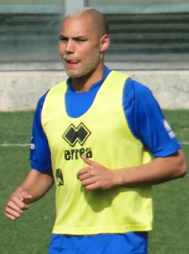 Yohan Benalouane, calciatore franco-tunisino